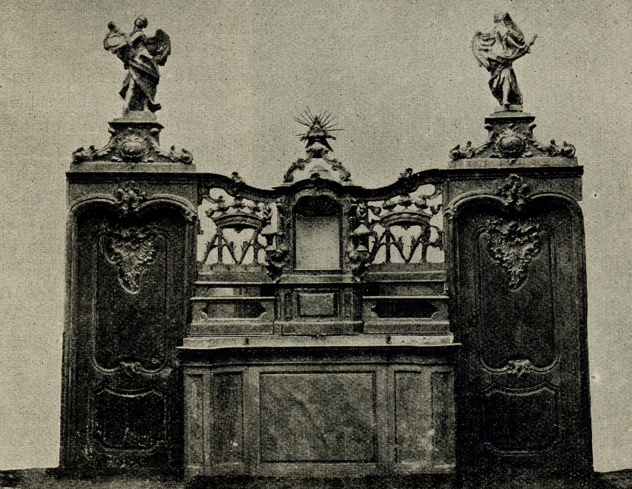 Couven-Altar in der Nikolauskirche, Aachen